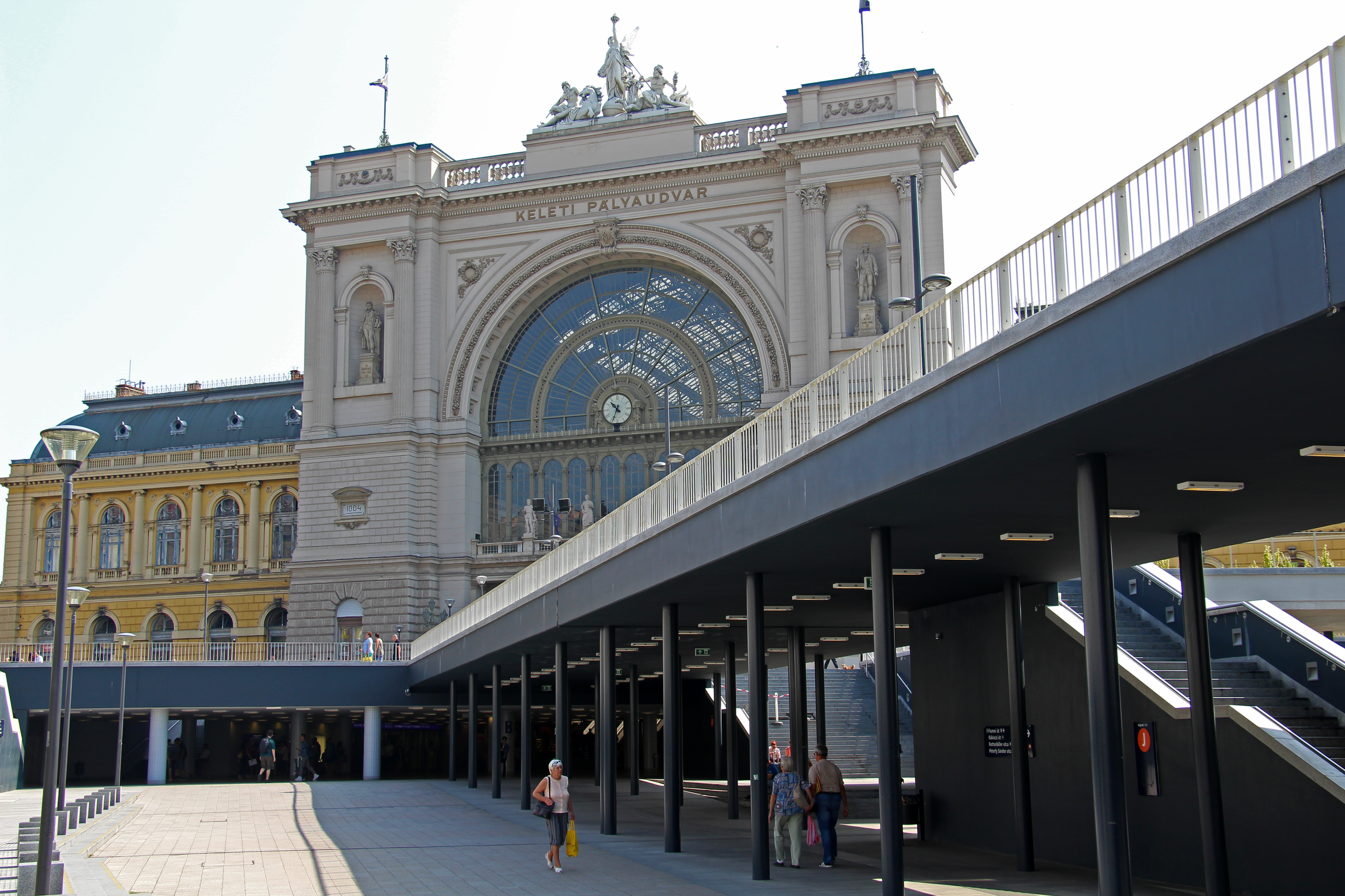 Józsefváros - Baross tér Budapest-Keleti railway station. Arch. Gyula Rochlitz and János Feketeházy 1881-84